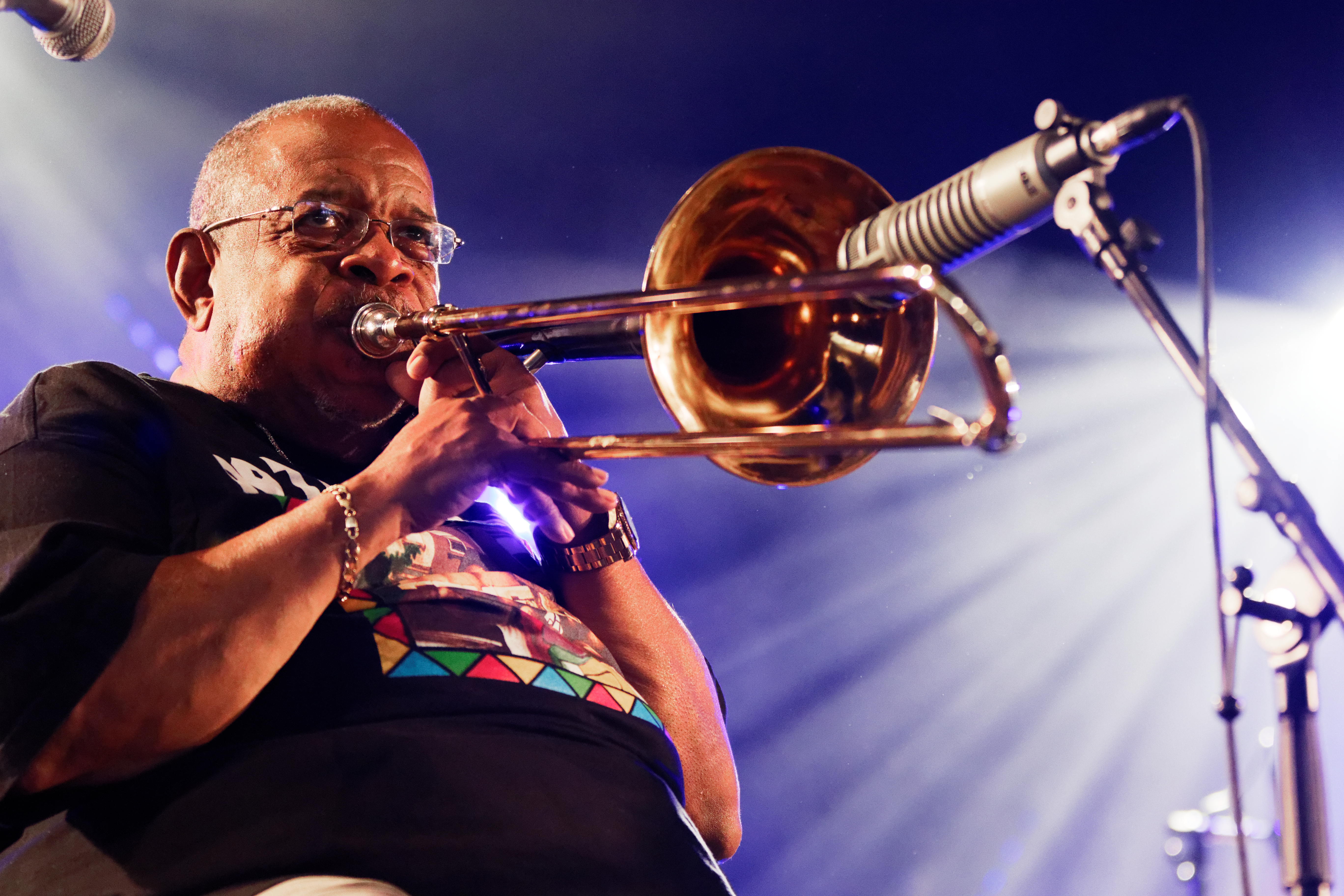 Fred Wesley & the new JB's en concert sur la scène du chapiteau de Seb lors du festival du Bout du Monde 2016 à Crozon dans le Finistère (France).